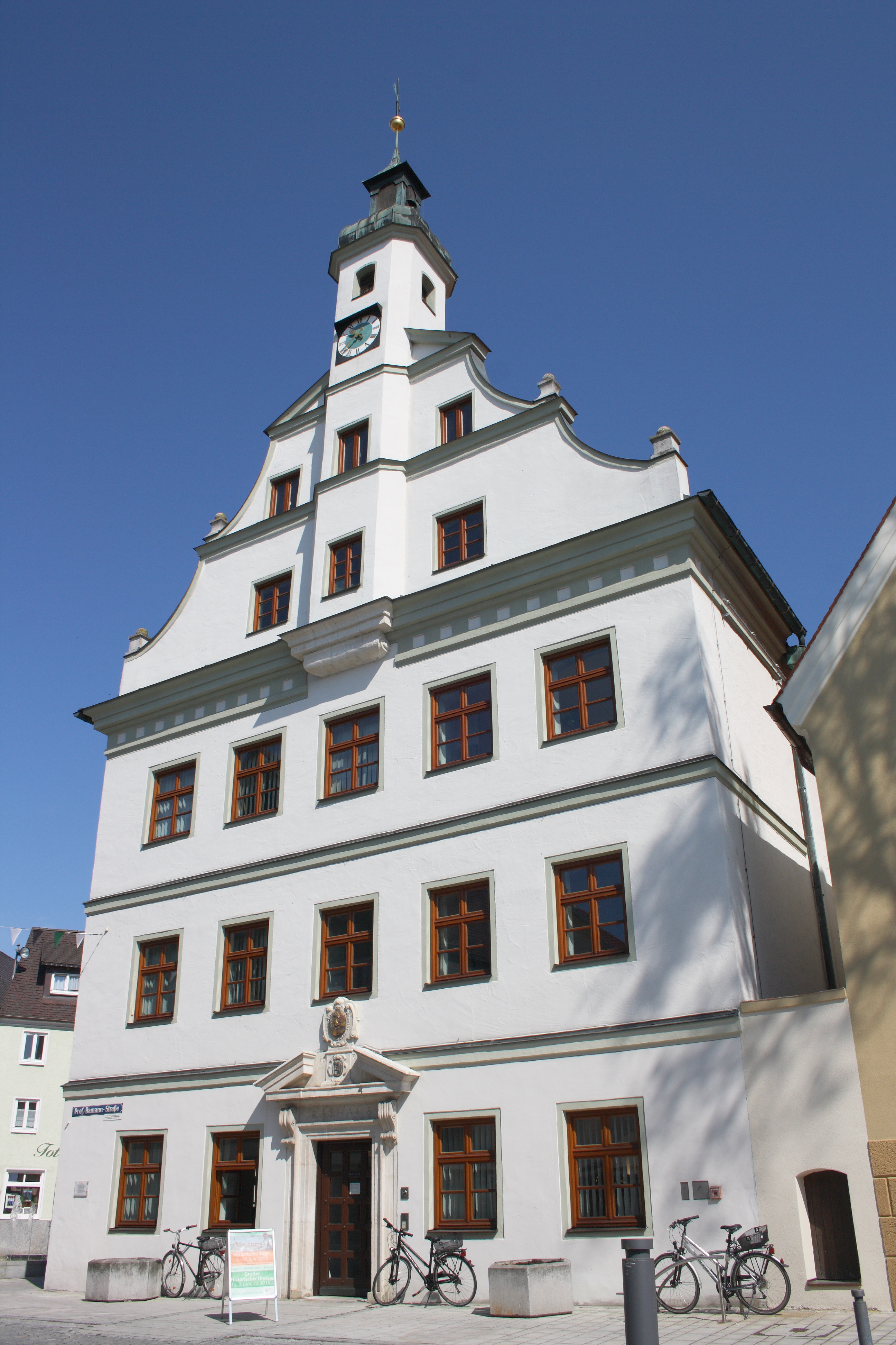 Rathaus in Gundelfingen an der Donau